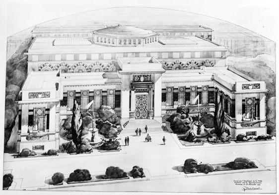 Fonds Trutat - Photographie ancienne Cote : BIBLC18 Localisation : Fonds ancien (S 30) Original non communicable Titre : Dessin en perspective de la Bibliothèque municipale de Toulouse, rue de Périgord, par l'architecte Jean Montariol, 1929 Auteur : Trutat, Eugène Rôle de l’auteur : Photographe Lieu de création : Toulouse (Haute-Garonne) Date de création : 1929 Mot(s)-clé(s) : -- Dessin -- Bâtiment -- Bibliothèque -- Décor d'architecture -- Bibliothèque municipale de Toulouse -- Toulouse (Haute-Garonne) -- Haute-Garonne (Midi-Pyrénées) -- France -- 20e siècle, 2e quart -- Epoque Art déco Médium : Photographies -- Noir et blanc -- Reproductions d'oeuvre d'art Bibliothèque de Toulouse. Domaine public